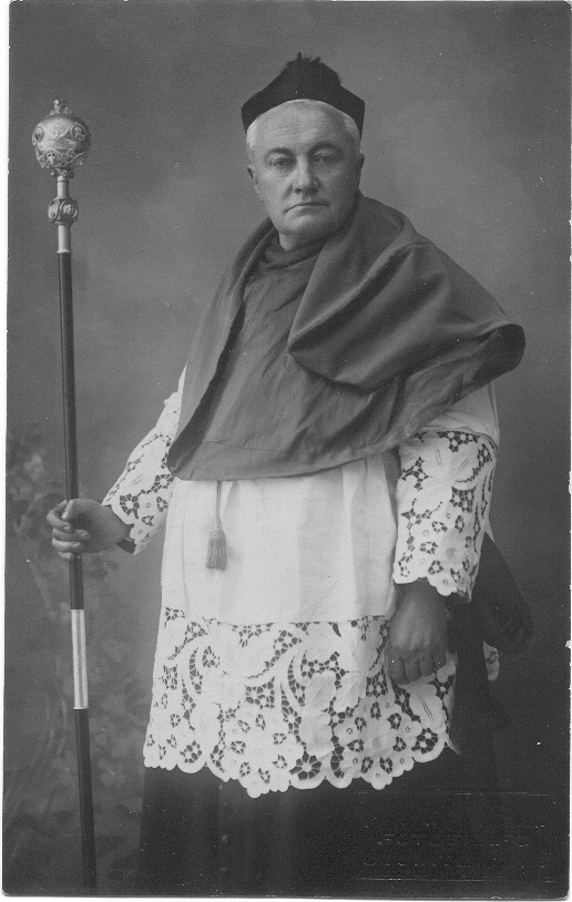 l'arciprete di Uggiate mons. Giovanni Tam